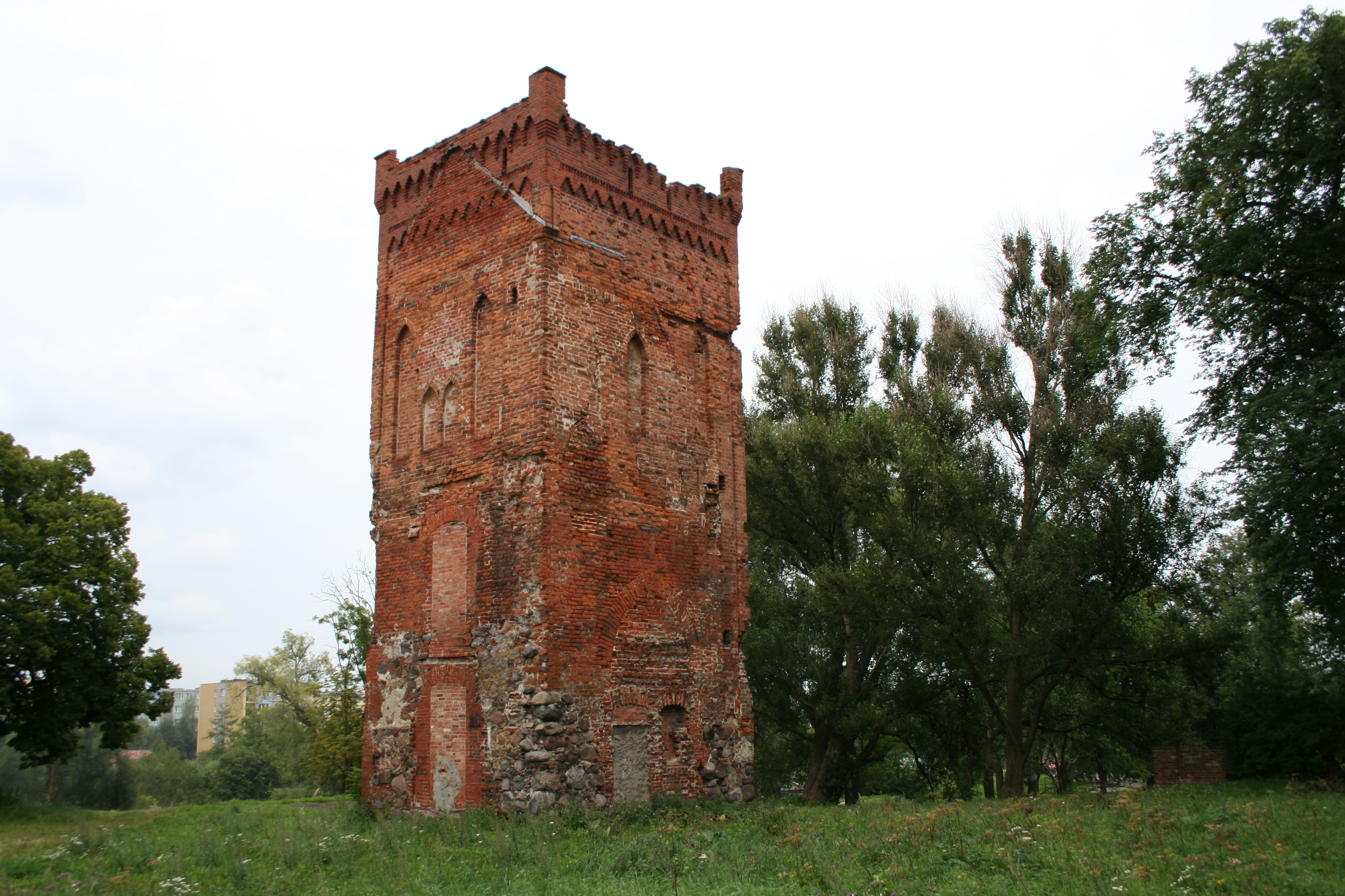 Wieża Bramna zamku biskupów warmińskich w Braniewie, XIV w.